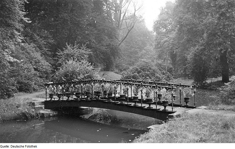 Original image description from the Deutsche Fotothek Bad Muskau. Fuchsienbrücke im Park Muskau (Erzeugnis der Eisenhütte Keula)